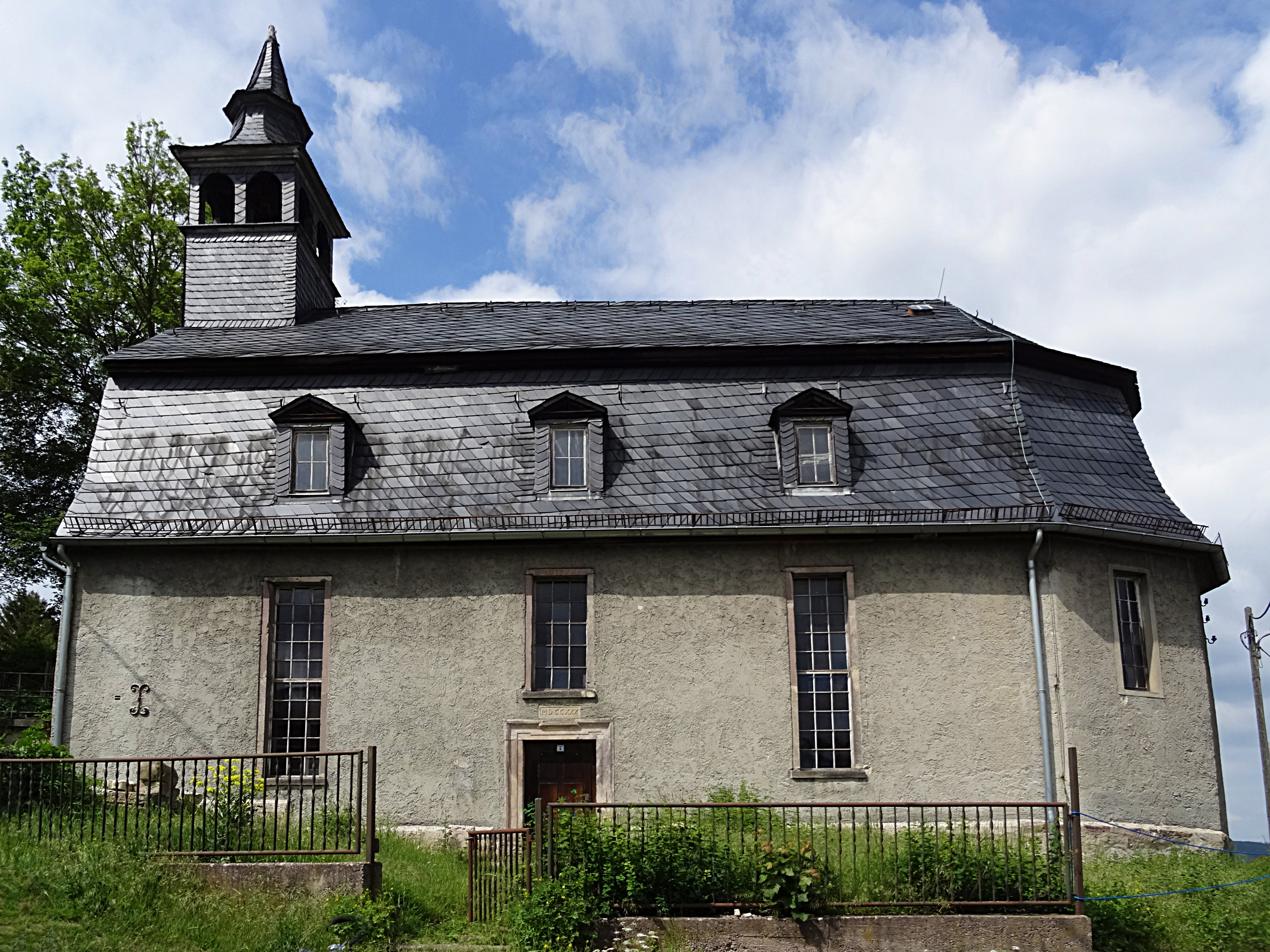 Sigismundkapelle Plaue 2020